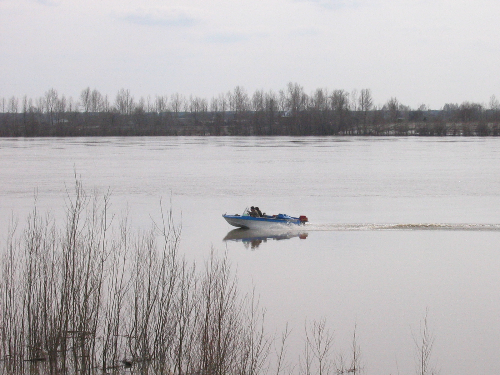 Моторная лодка